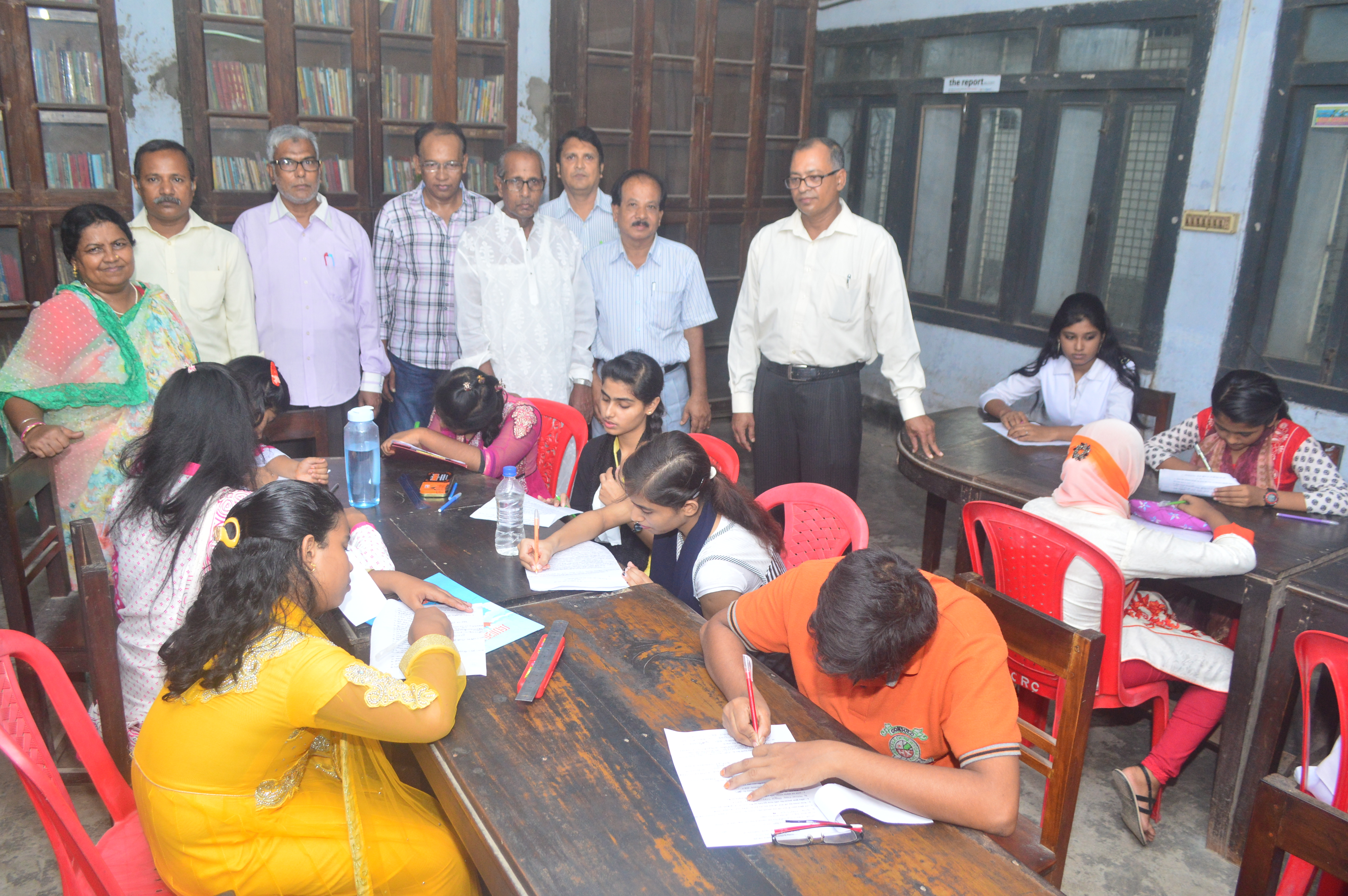 যশোর ইনস্টিটিউট পাবলিক লাইব্রেরী